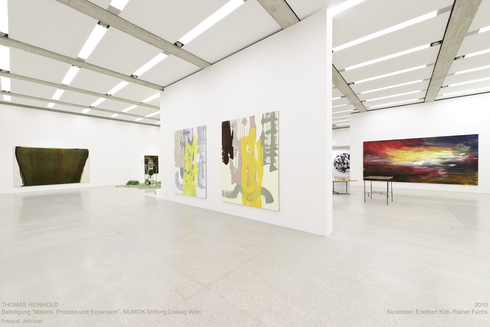 Raumaufnahme MUMOK Malerei: Prozess und Expansion 2010